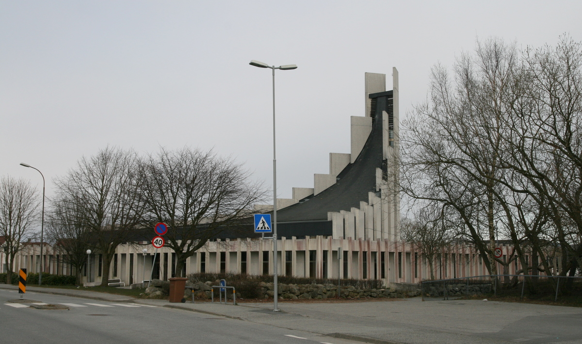 Gand_kirke